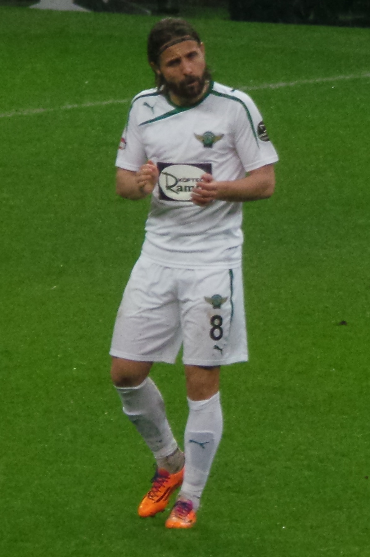 Emin Aladağ